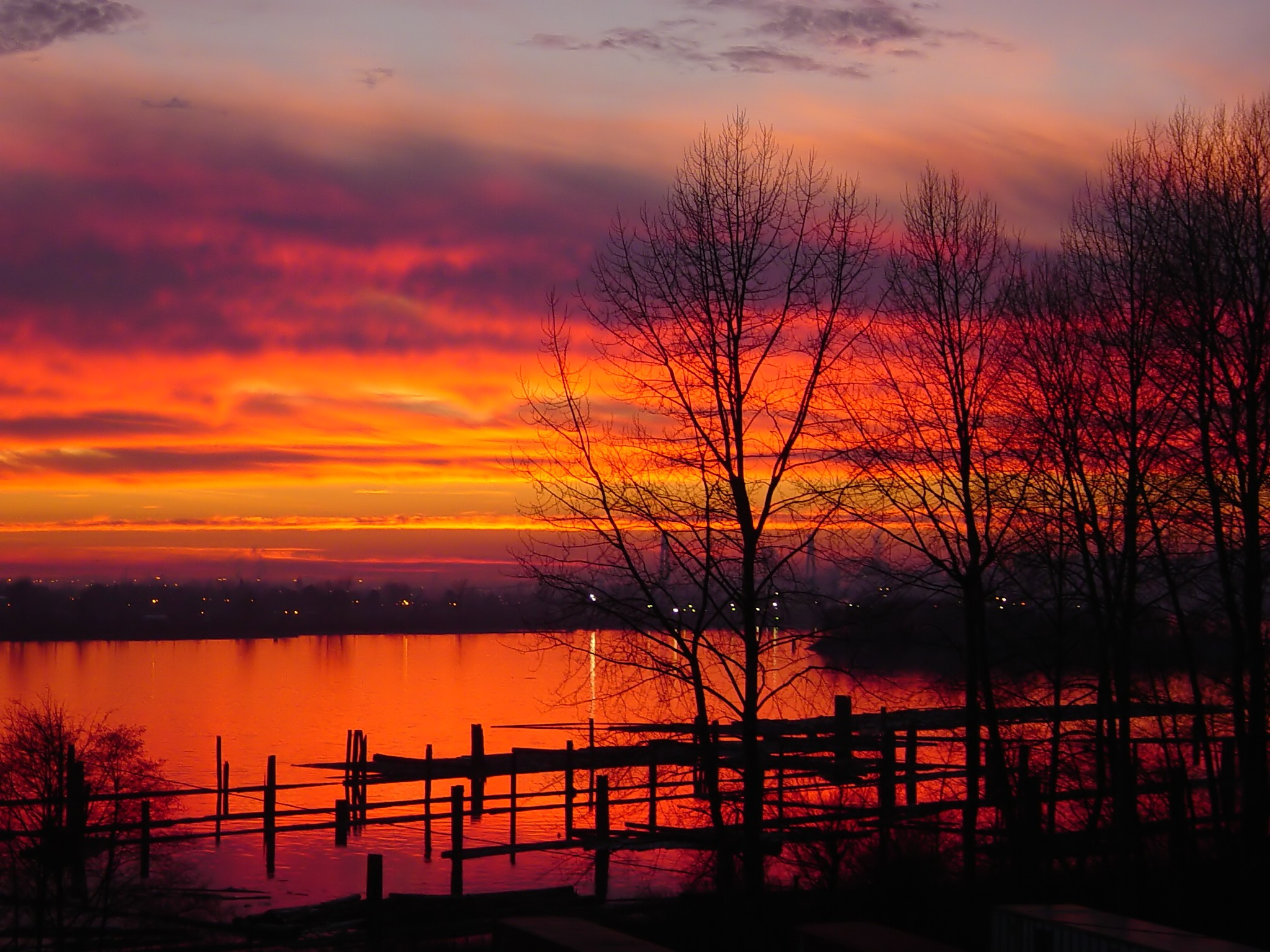 Sunset in Coquitlam: Fraser River view